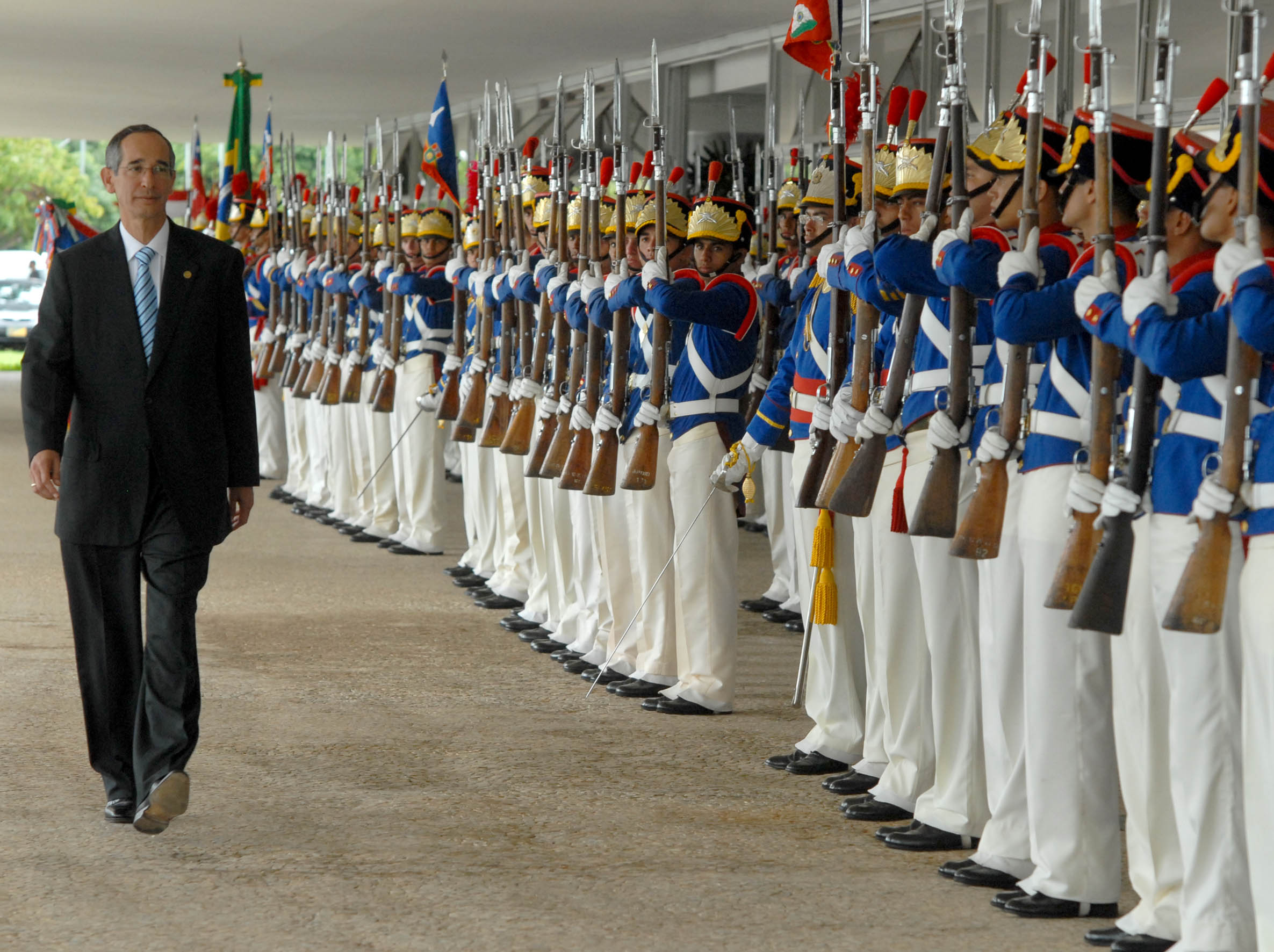 Brasília - Presidente da Guatemala, Álvaro Colom Caballeros, chega ao Palácio do Planalto para visita oficial ao Brasil.